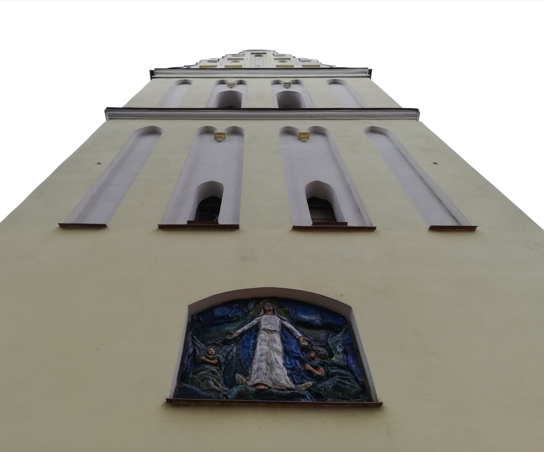 Dzwonnica kościoła Wniebowzięcia NMP w Kruklankach, we wnęce płaskorzeźba przedstawiająca Maryję braną do Nieba